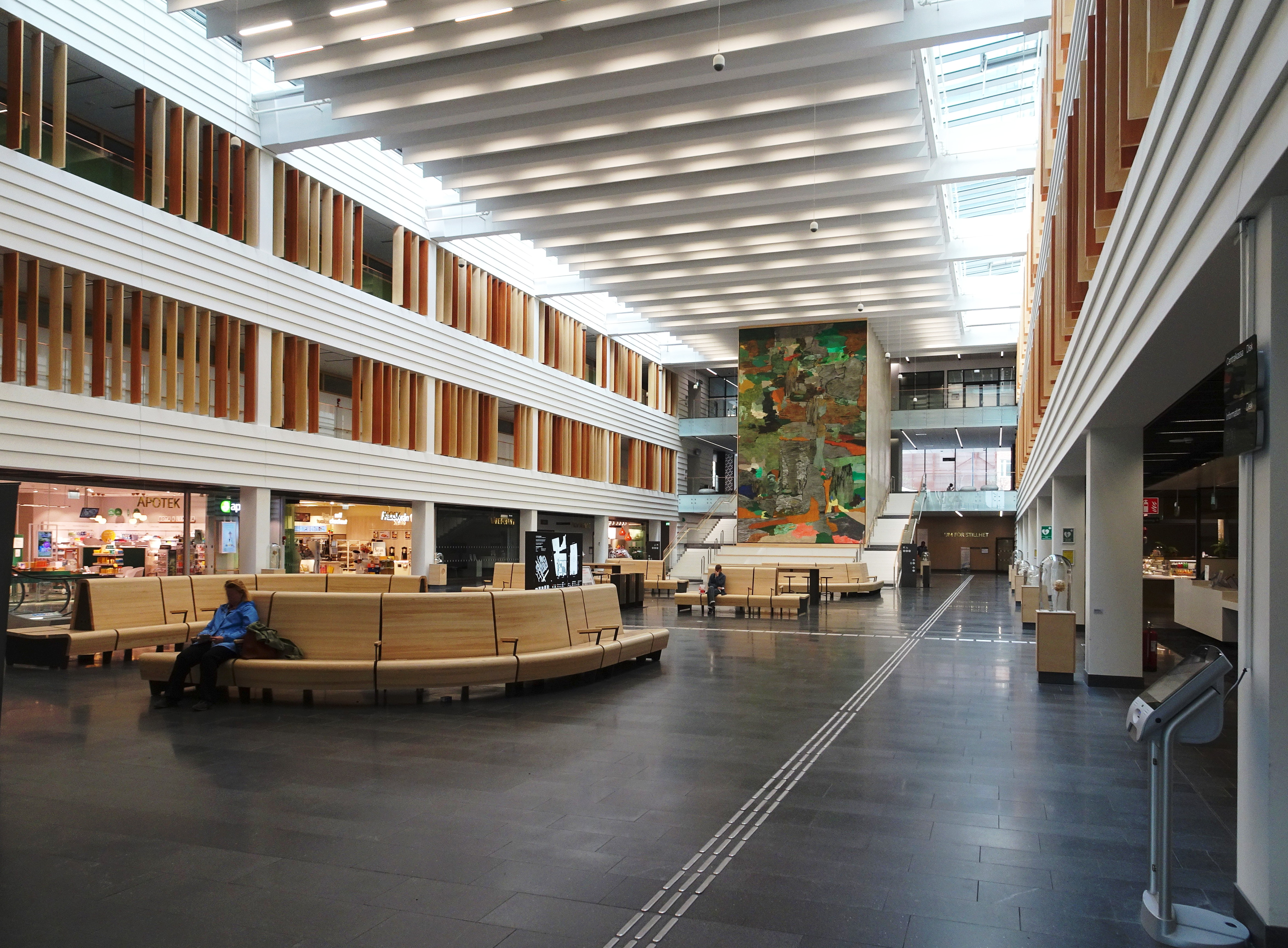 Nya Karolinska sjukhuset, huvudentré, entréhall